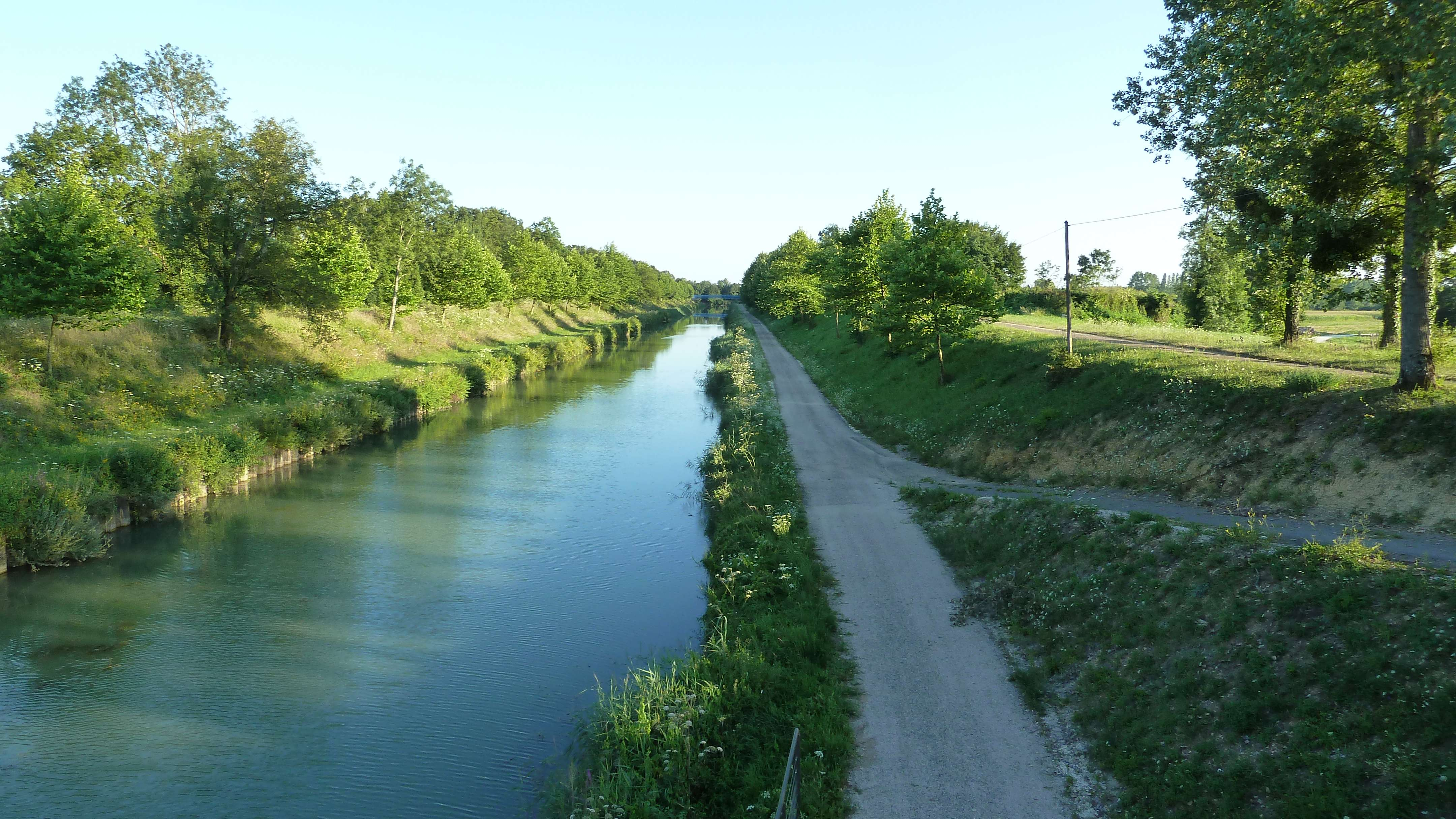 Canal de la Saône à la Marne vue du pont de Maxilly sur Saône.